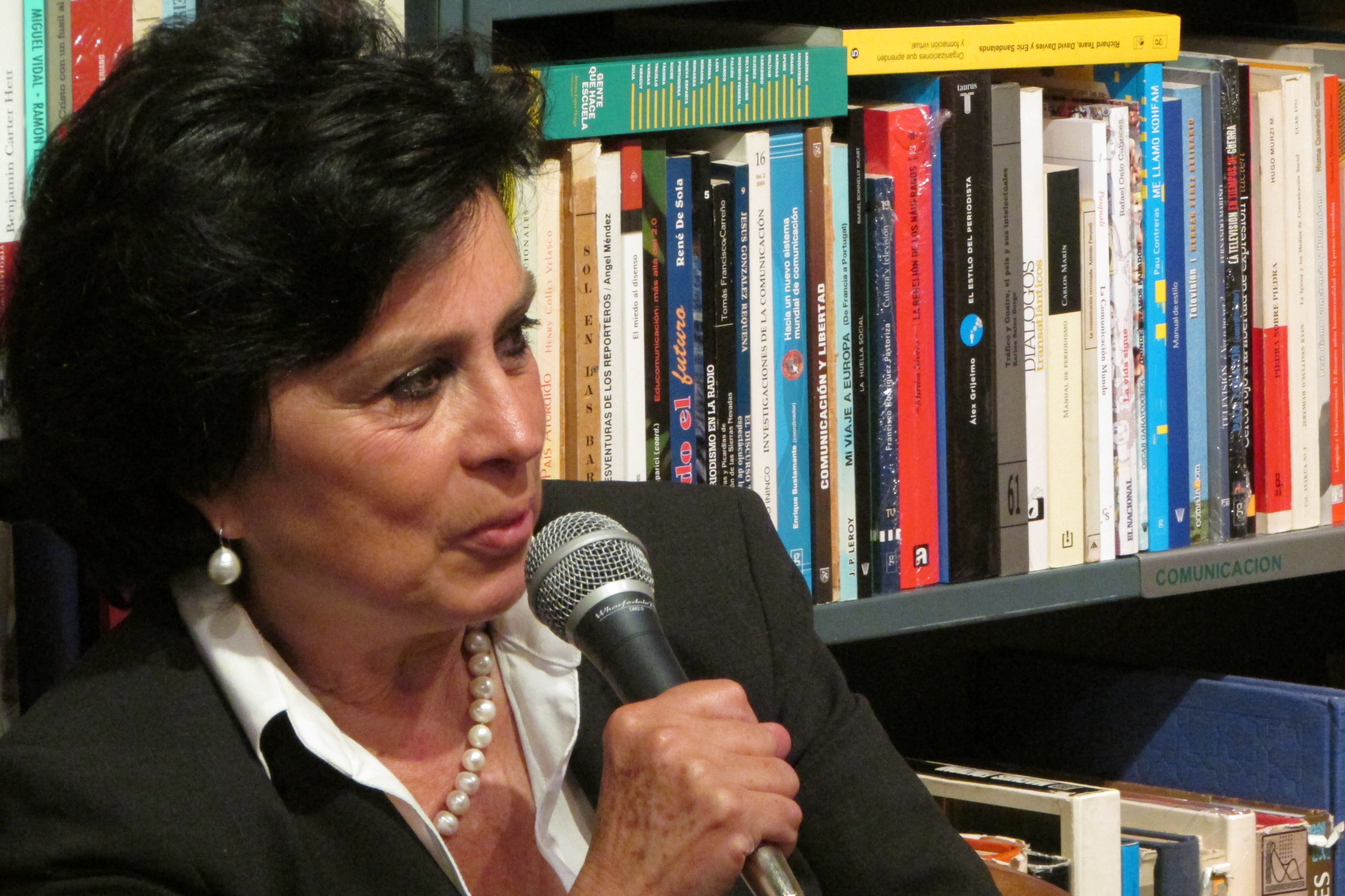 Laura Restrepo, escritora colombina.